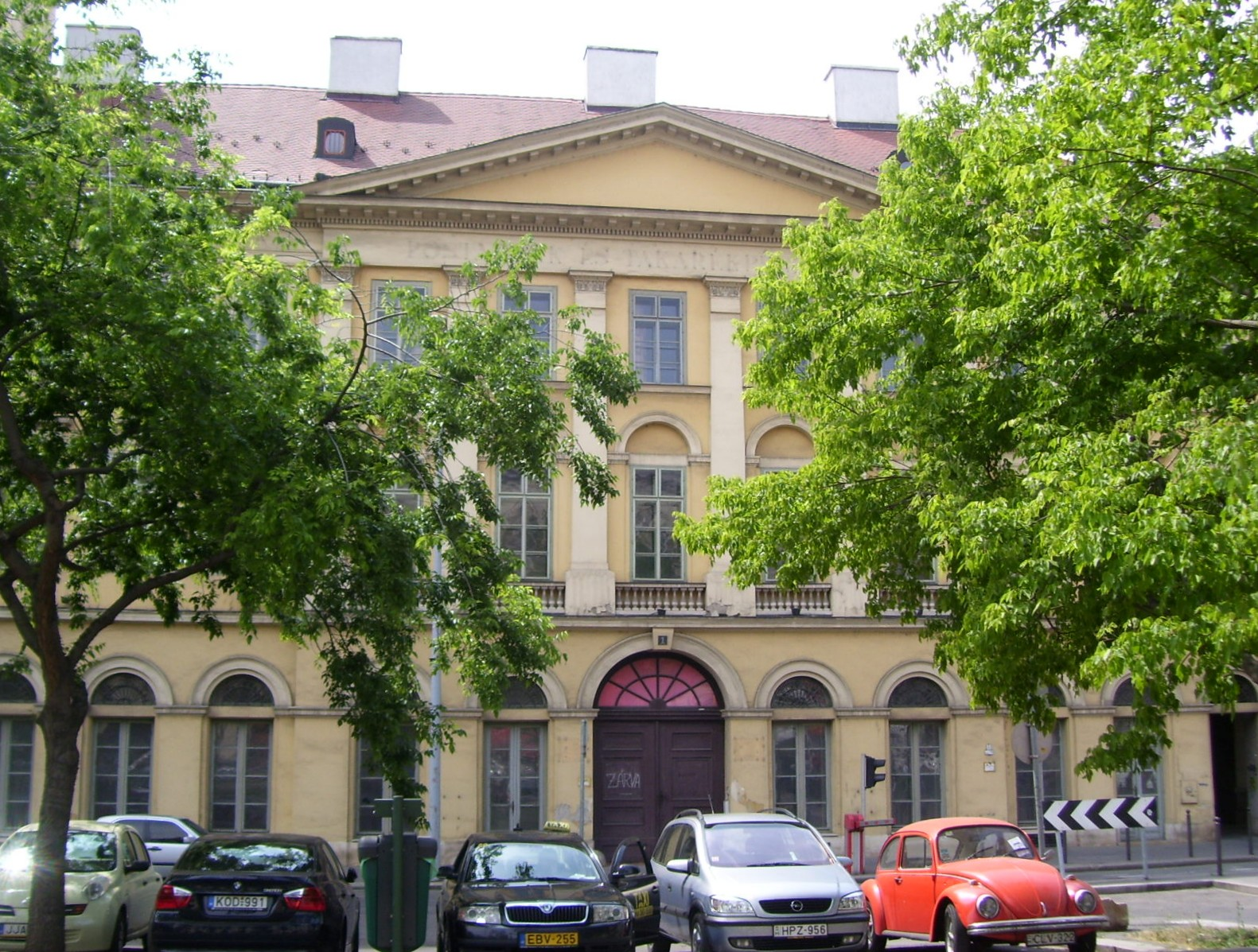 Budapest V., József nádor tér 1. alatti lakóház (1824)